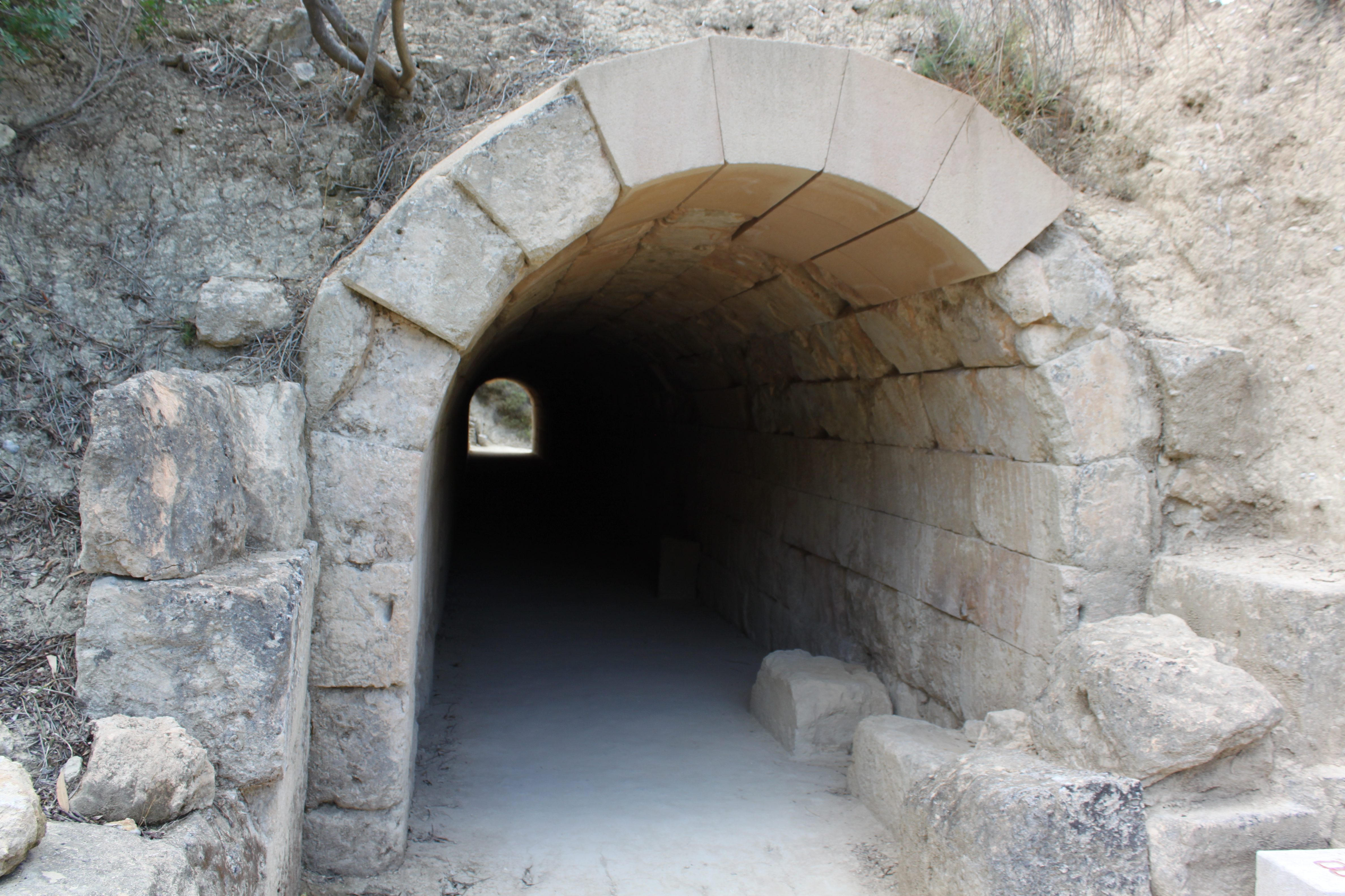 Galerie du stade antique de Némée